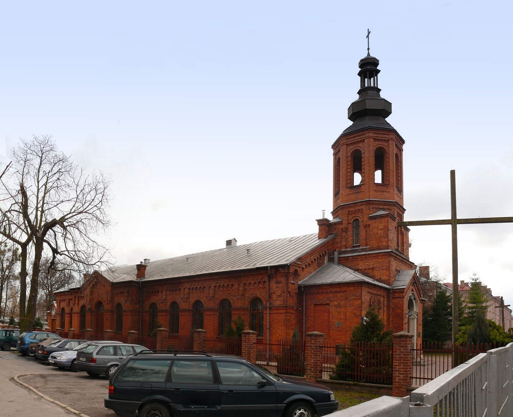 Garnizonowo-Cywilny Kościół Parafialny w Chełmie